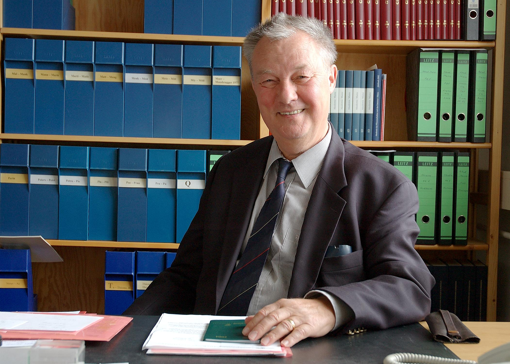 Porträtfotografie von Prof. Dr. Michael Müller-Wille